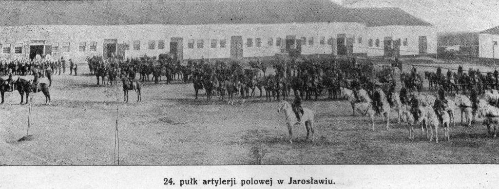 24 Pułk Artylerii Polowej w Jarosławiu